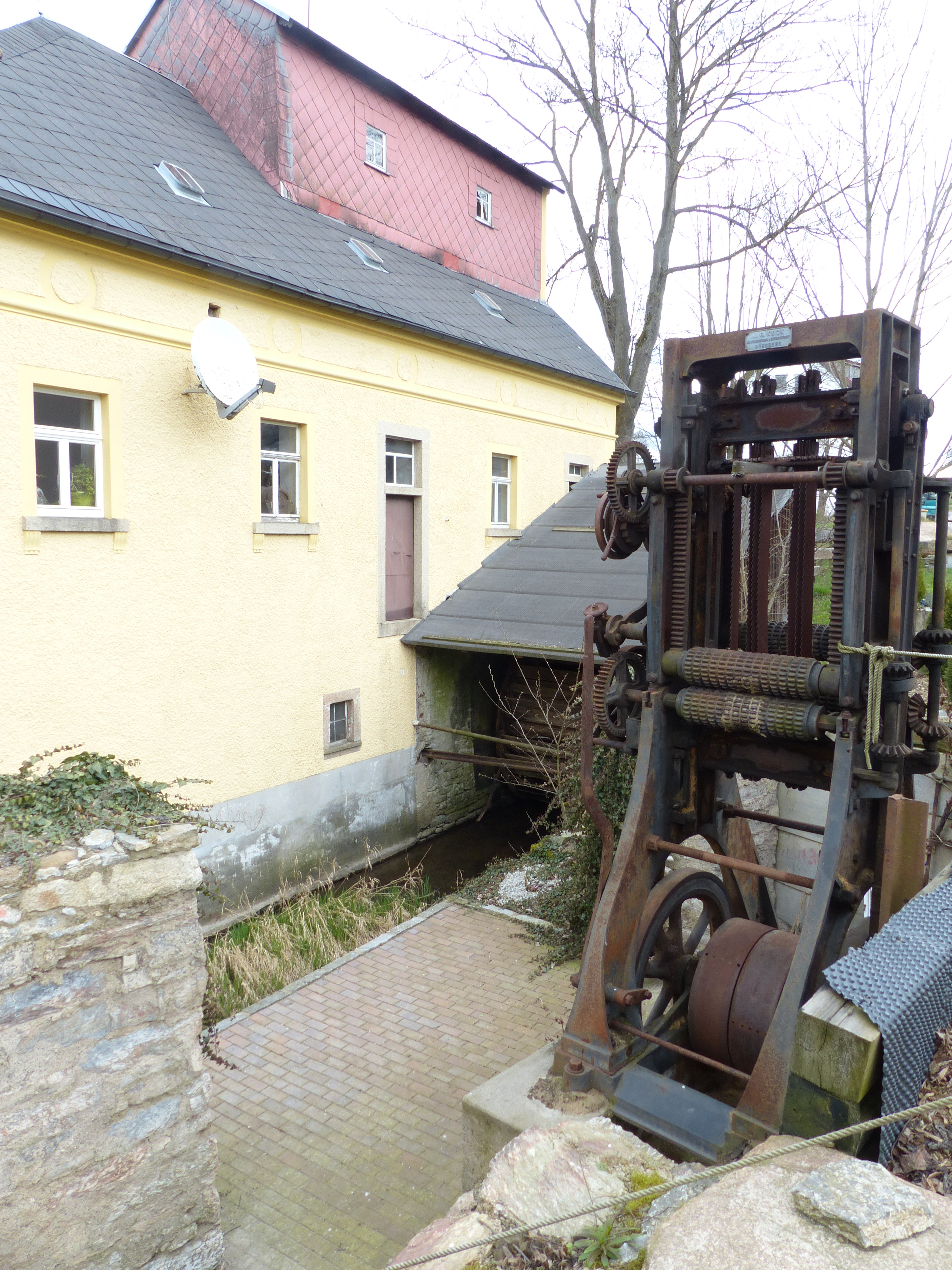 Klötzlamühle mit Mühlanlage, oberschlächtiges Wasserrad